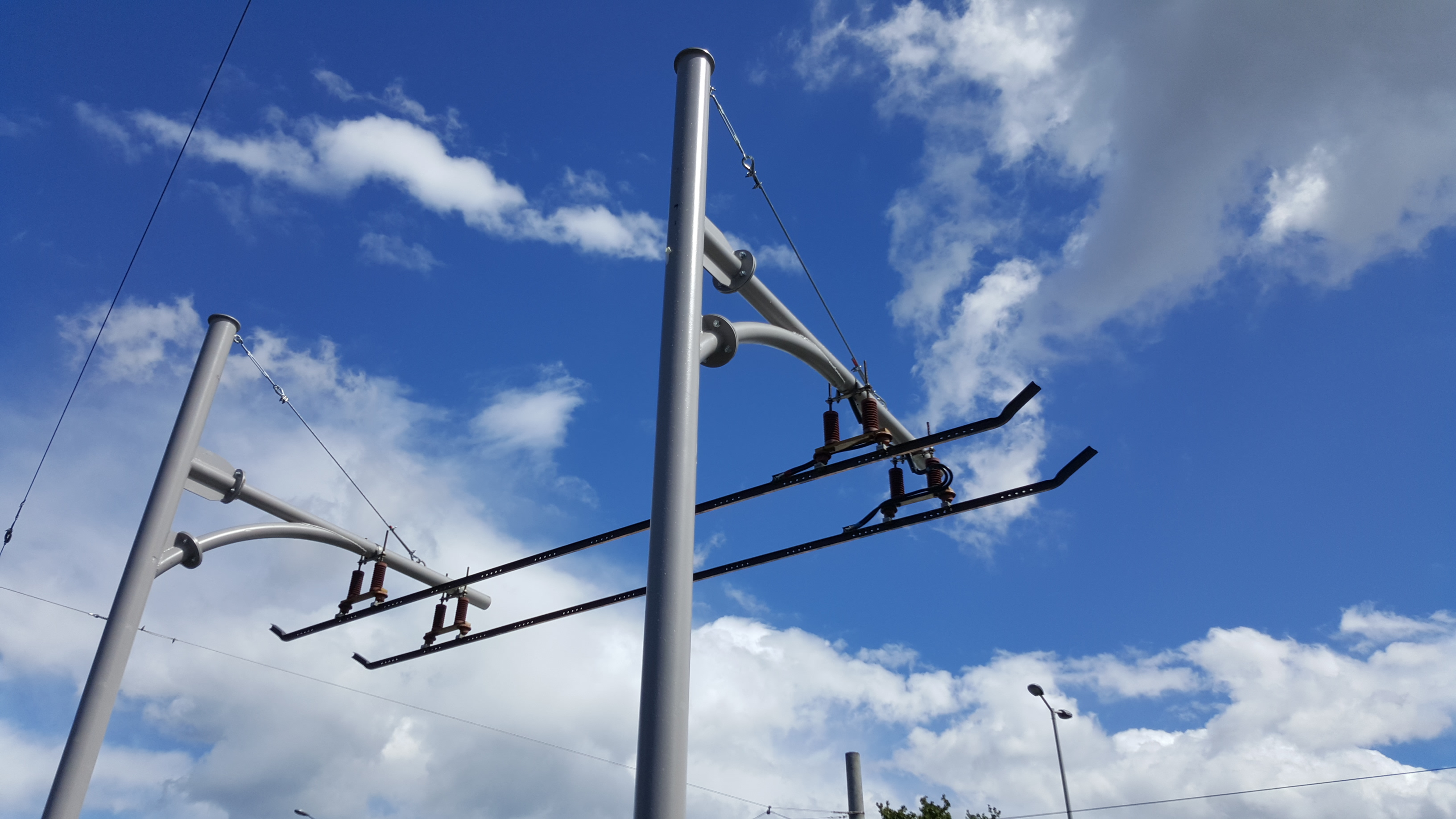 Ladestation für Elektrobusse an der Grazer Haltestelle Zentralfriedhof